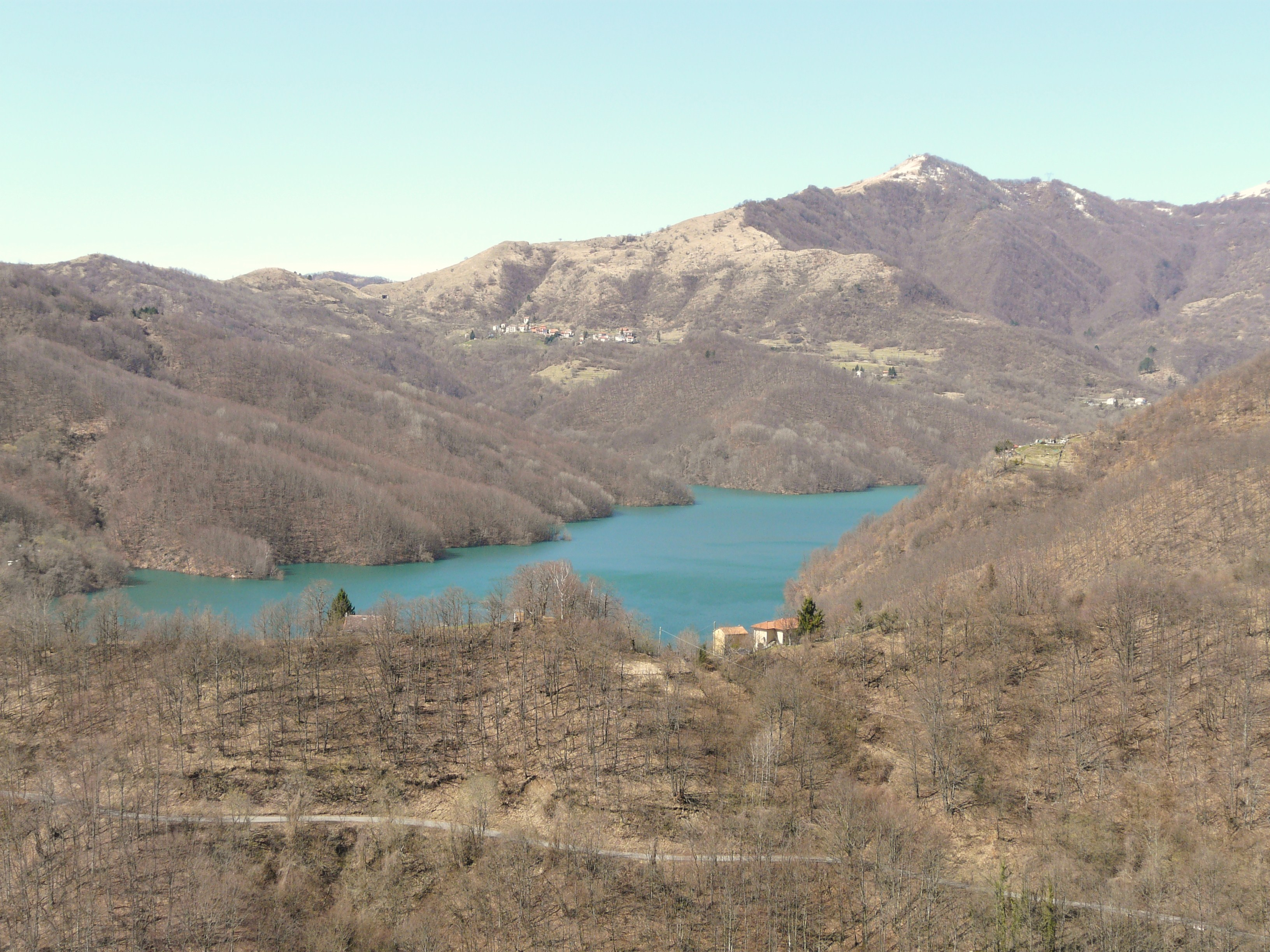 Lago del Brugneto visto da Fascia, Liguria, Italia